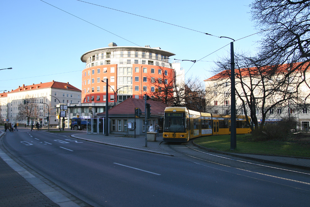 Endhaltestelle der Linie 8 in Dresden am Nürnberger Ei